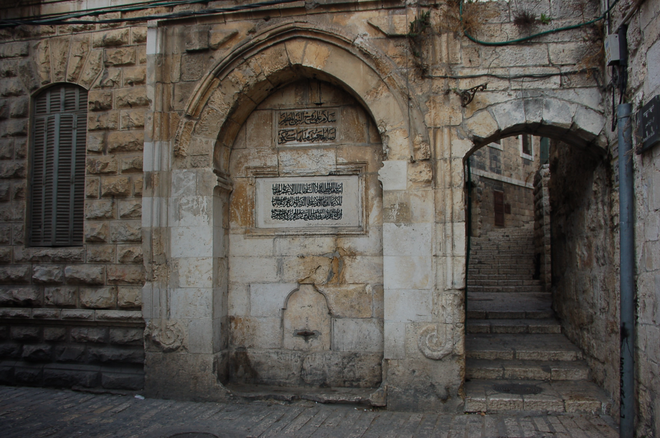 Jerusalem